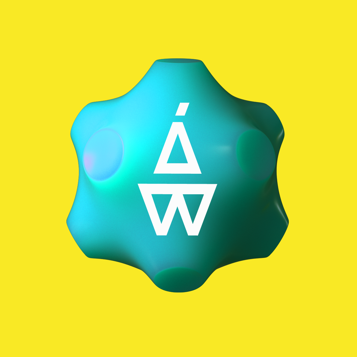 Лого фестивалю Atlas Weekend 2019